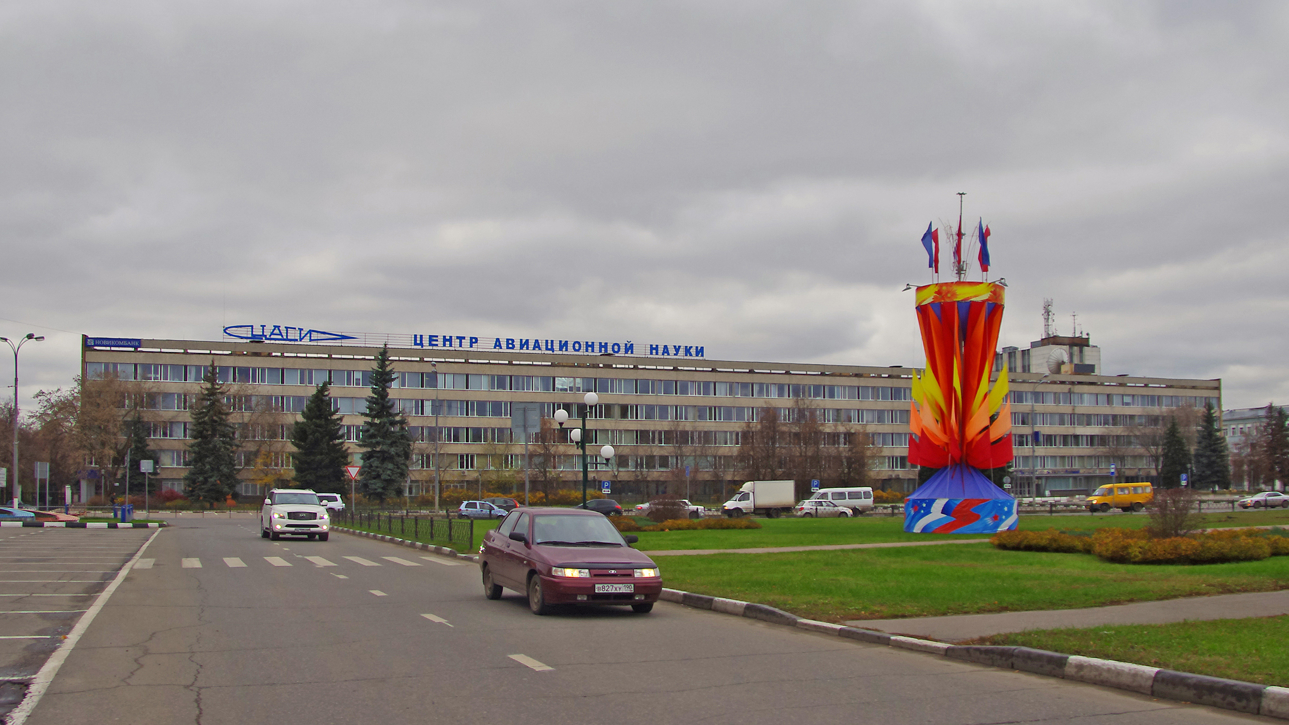 Zhukovskiy, Moscow Oblast, Russia